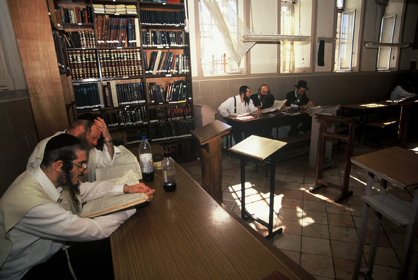 בתי ראנד היא שכונת חצר בירושלים, בין רחוב בצלאל לבין שכונת מחנה יהודה. נקראת על שם מייסדה, מנחם מנדל הכהן ראנד. בשכונה בתים שיתופיים בני שתי קומות, עם אלמנטים פיסוליים רבים, הבנויים מסביב לחצרות פנימיות.